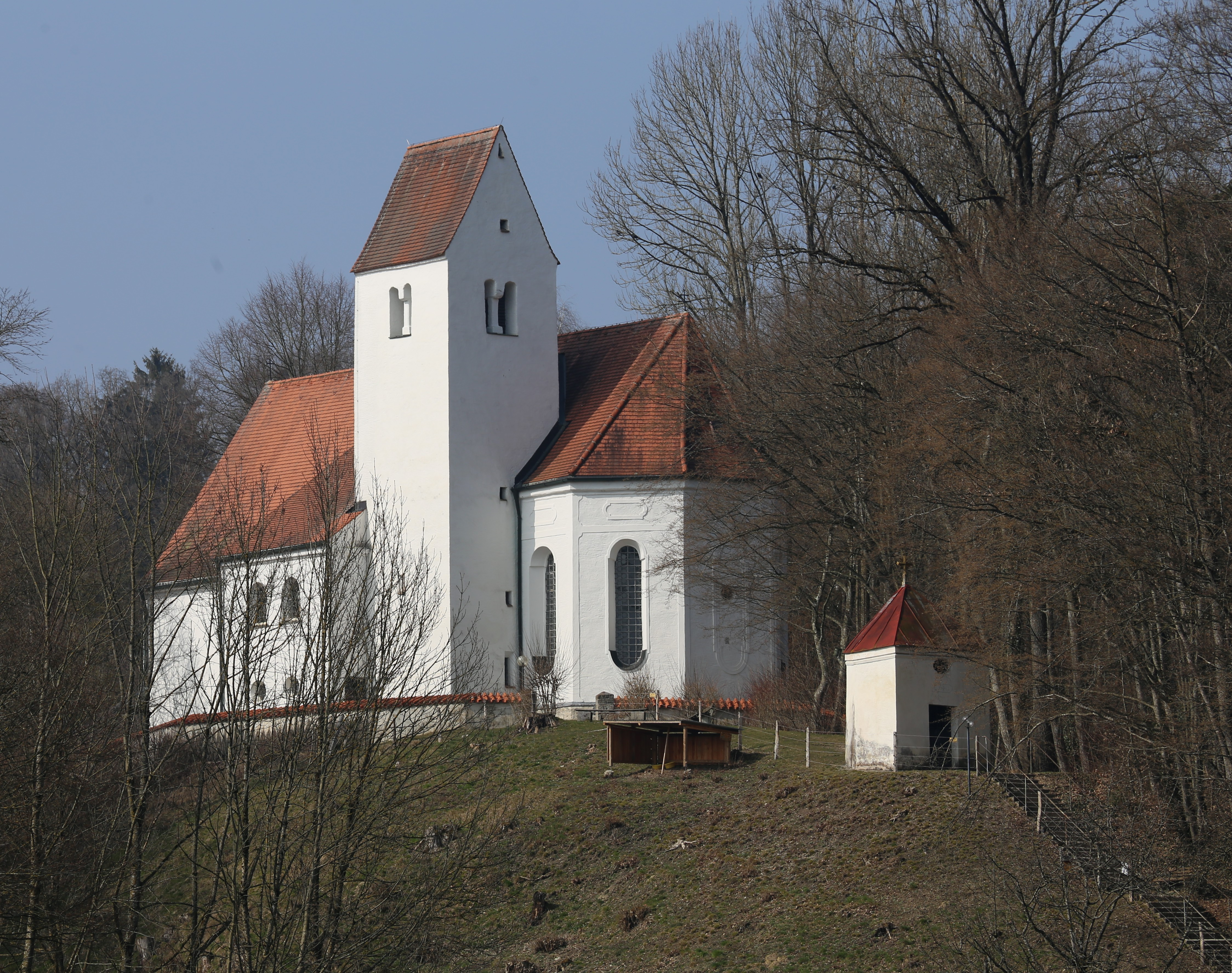 Maria Altenburg, Moosach, Landkreis Ebersberg